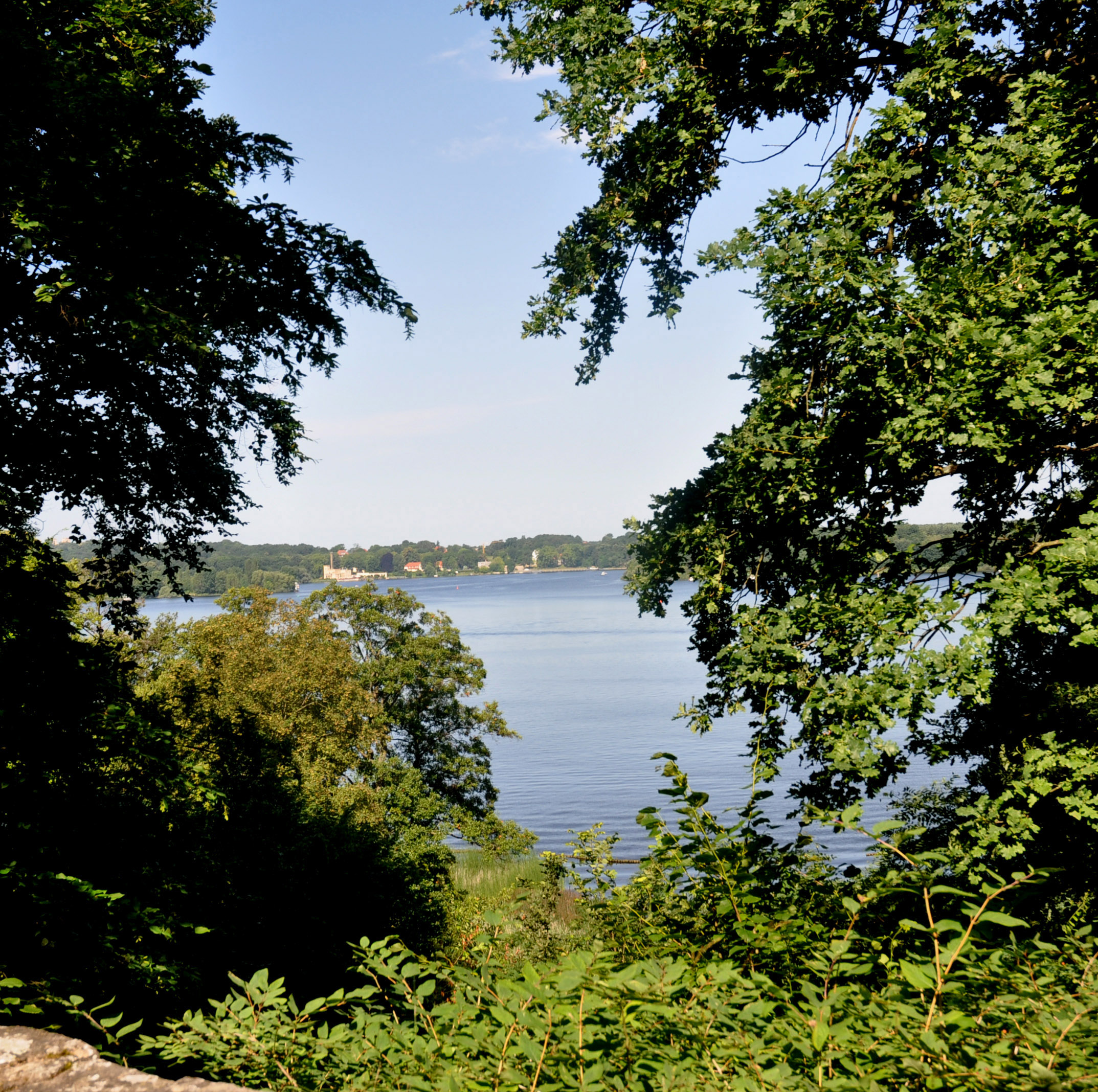 Blick vom Standpunkt des Großen Jagdschirms zur Meierei im Neuen Garten